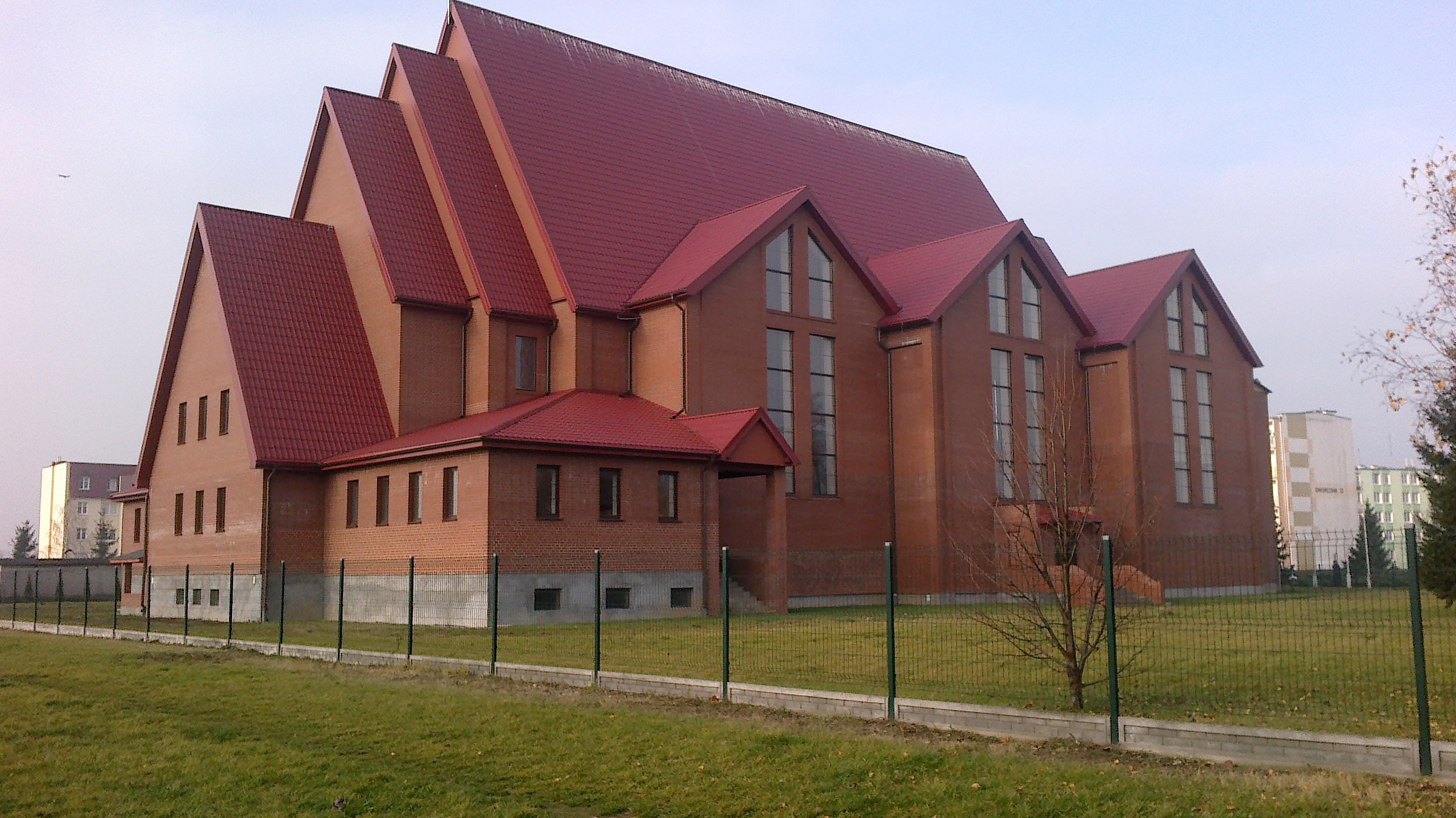 Kościół przy ul. Kozala w Janikowie